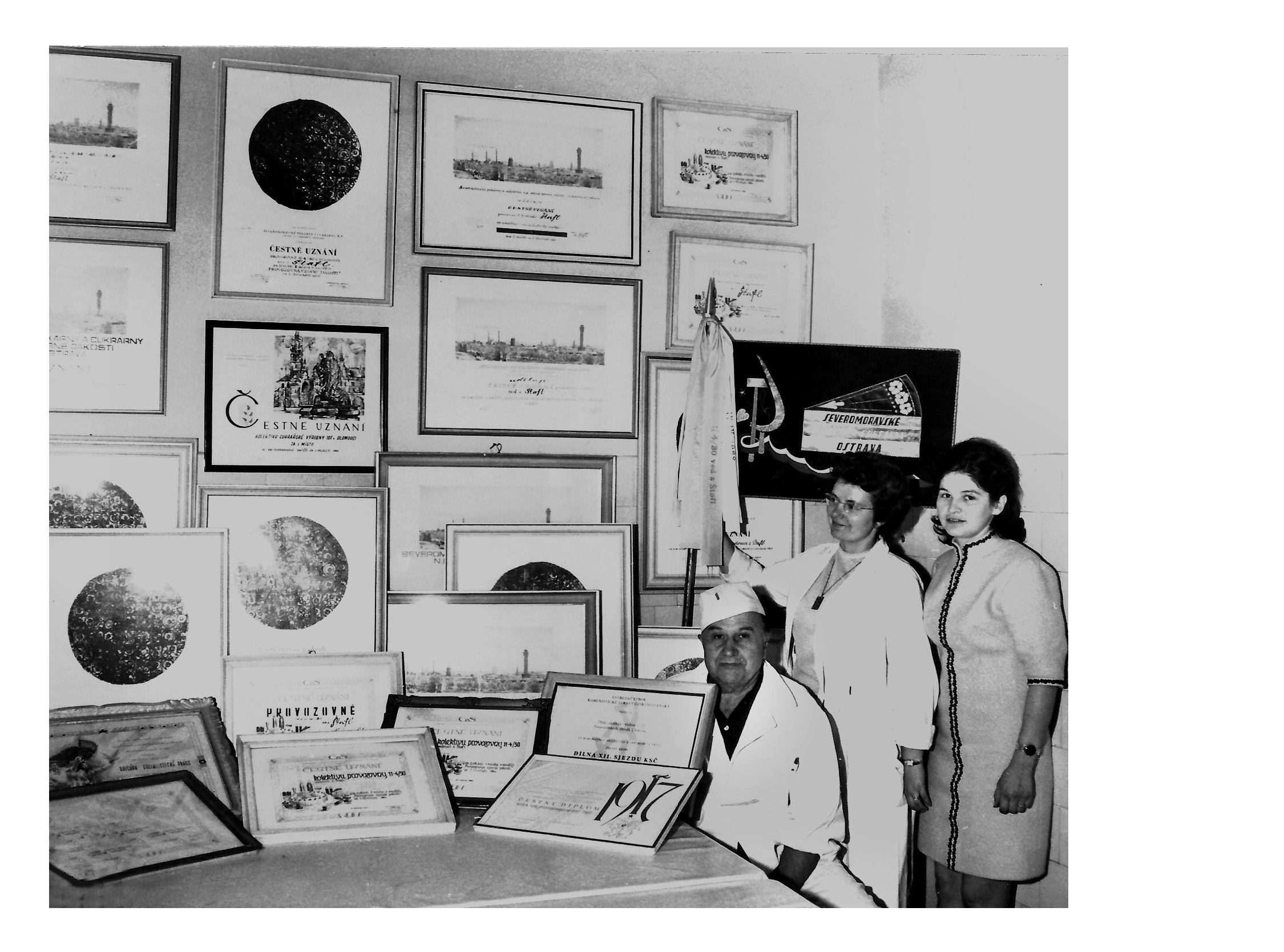 Josef Štafl s diplomy z cukrářských soutěží